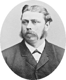 Carl Gustaf Piehl, ägare till C G Piehls Bryggeri